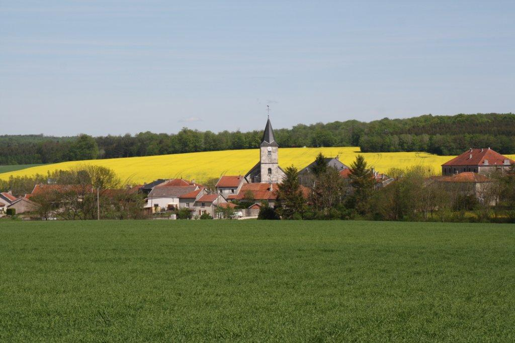 Vue générale